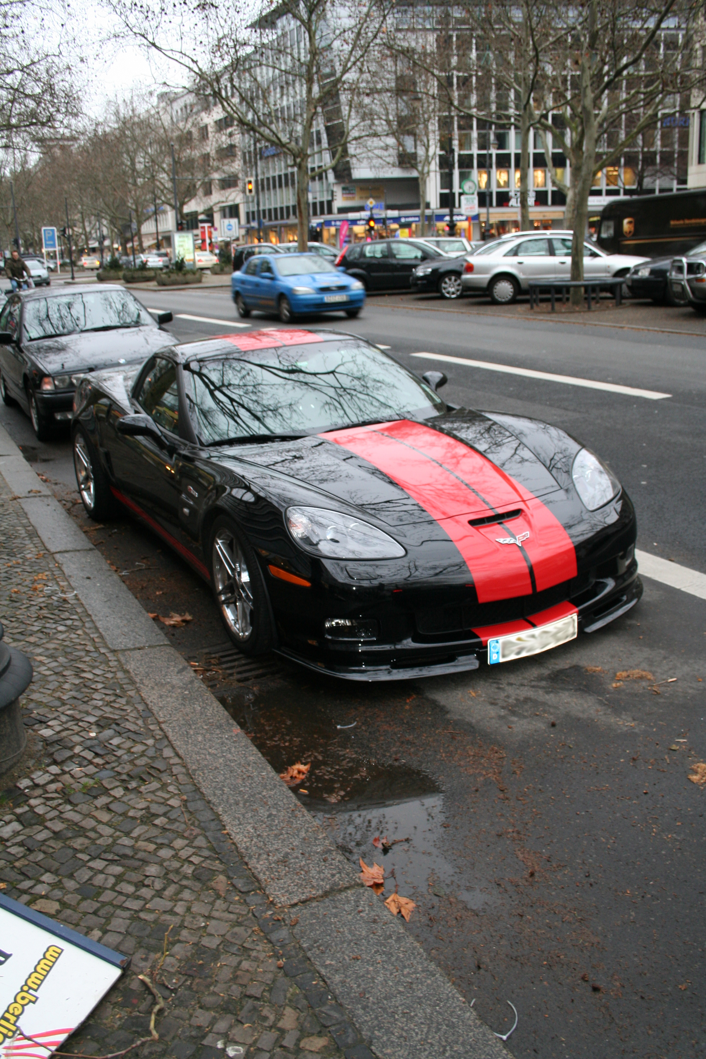 Corvette Z06 at Unter der Linden